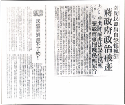 一九四七年十月二十七日，國民黨指“民主同盟勾結共匪、參加叛亂，宣布予以取締。”自此，民盟轉入地下，圖為當時報刊刊登的中共和民盟地方組織有關抗議國民黨非法解散民盟的消息和言論。